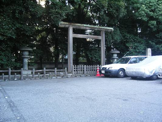 この写真は2004年(平成16年)8月19日に撮影されたものです